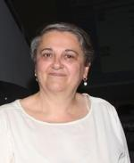 Valeria Mancinelli, sindaco di Ancona (Marche, Italia).